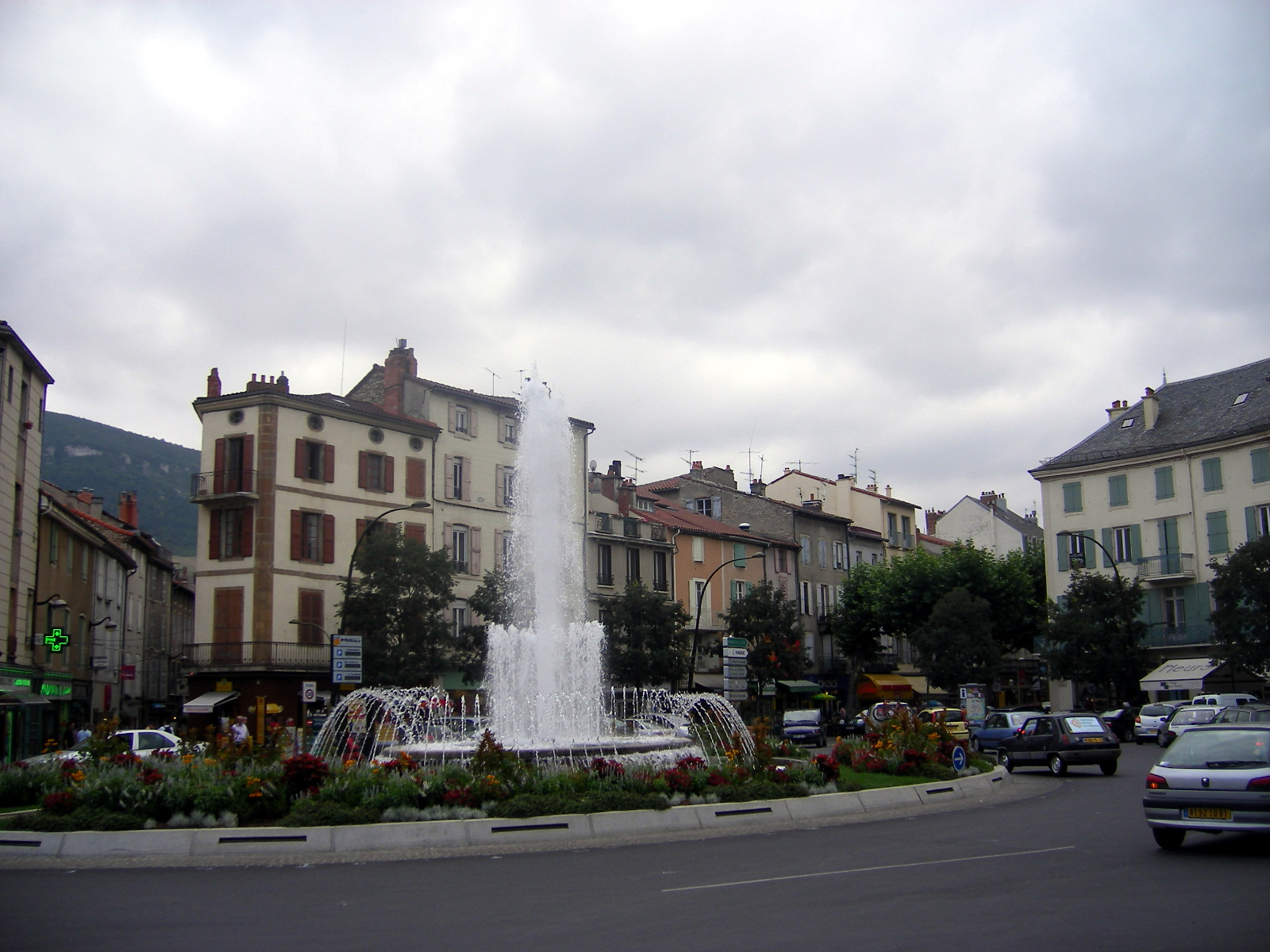 Millau